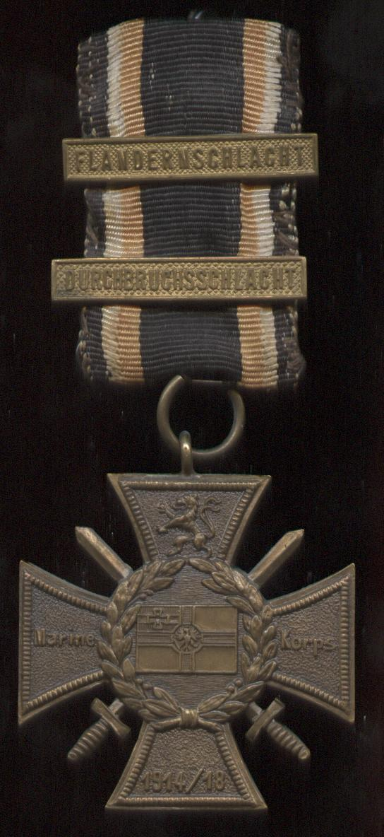 Flandernkreuz oder „Ehren- und Erinnerungskreuz des Marinekorps Flandern“ (hier: Advers mit zwei Gefechtsspangen), deutsche Weltkriegsgedenkauszeichnung der Weimarer Republik (13.September 1921).